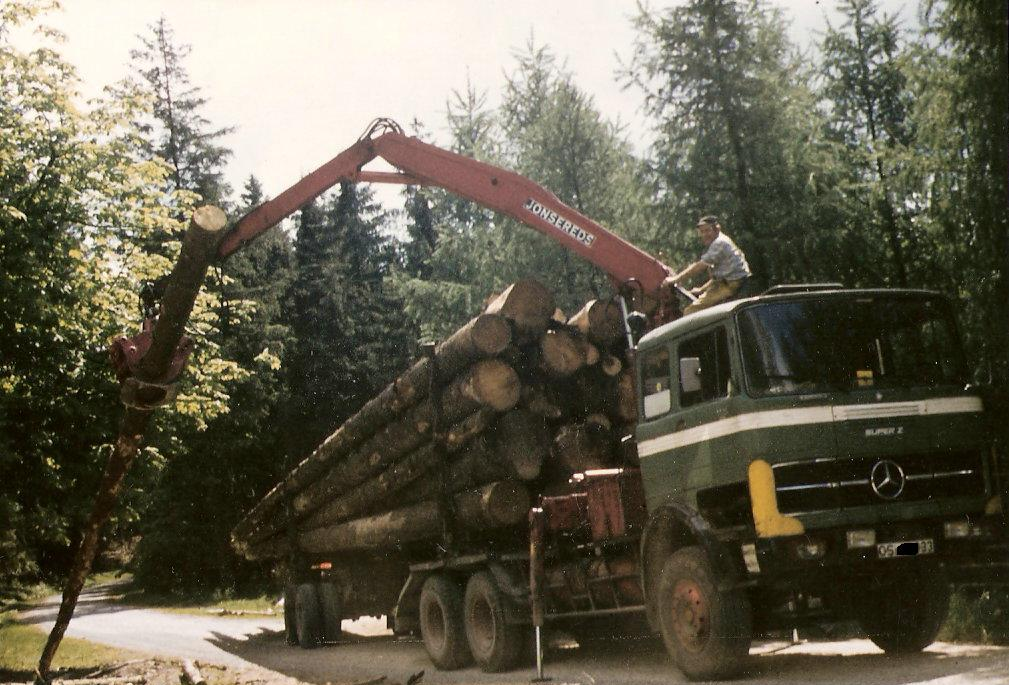 Langholz LKW Mercedes-Benz 22.240 mit Jonsereds-Kran